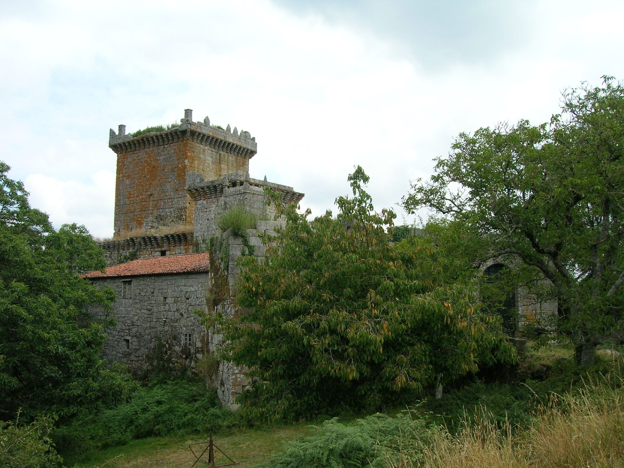 Ces: Castillo de Pambre. Construido a finales del siglo XIV por don Gonzalo Ozores de Ulloa, sobre un escarpado peñasco a orillas del río Pambre que ejerce de defensa natural. Durante años fue escenario de las luchas, primero entre Pedro I y Enrique de Trastamara y después entre la nobleza y el arzobispo de Santiago, Don Alonso de Fonseca y Acevedo. Después de pasar por manos de los Ulloa, en 1484, paso a propiedad de los condes de Monterrei. En 1895, el duque de Alba vende la fortaleza con sus bienes y otros edificios a D. José Soto, vecino de Palas de Rei, por 27.000 ptas. Por último, después de pertenecer a la familia Moreiras Blanco desde 1.912, en la actualidad es propiedad de D. Manuel Taboada Fernández, conde de Borraxeiros.